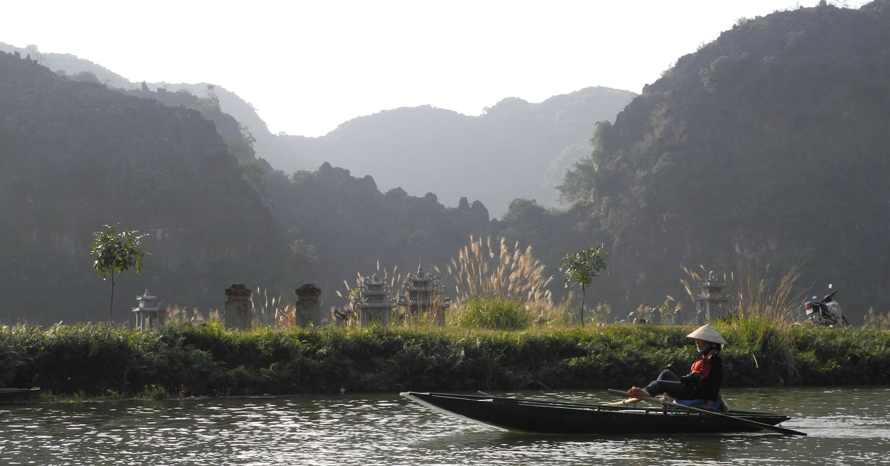 Ninh Binh-Tam Coc